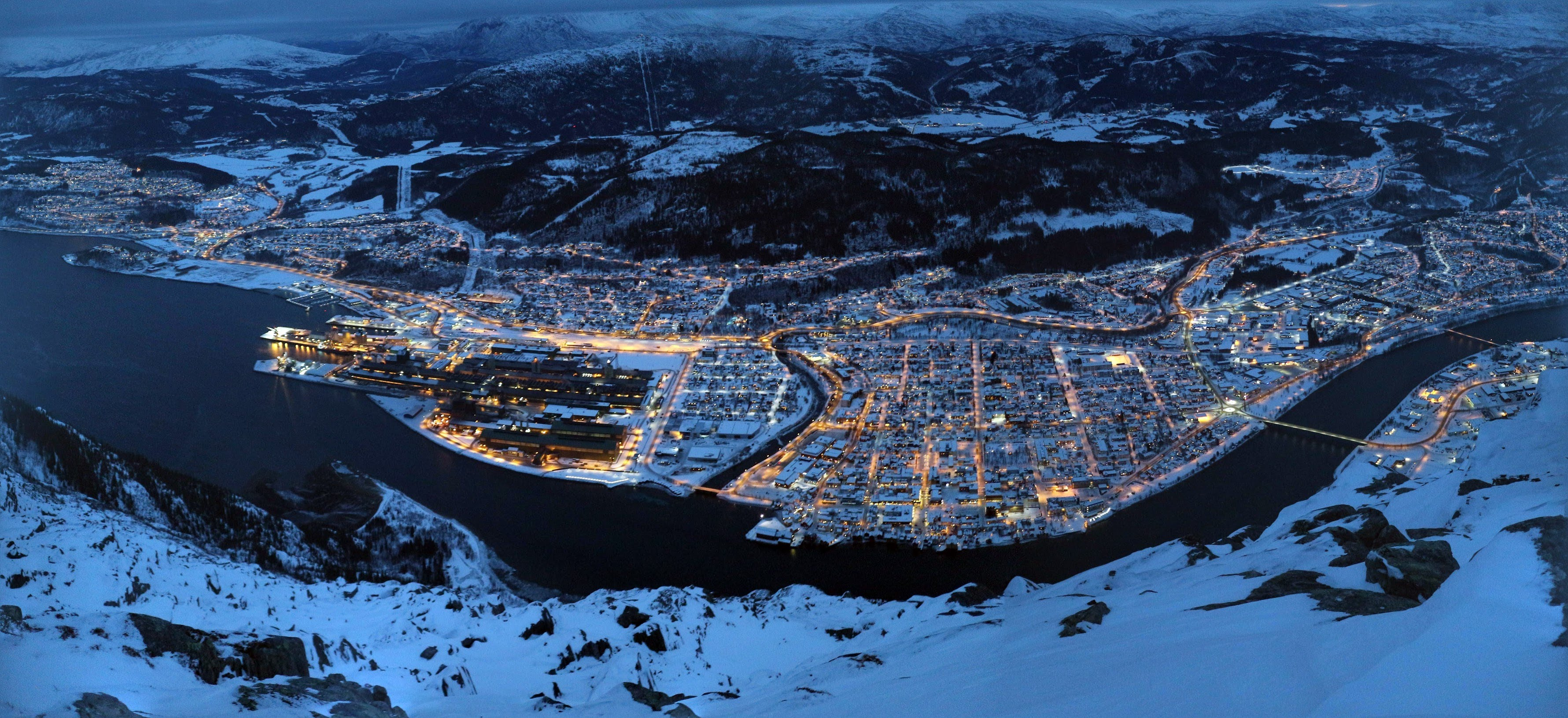 Utsikt over Mosjøen fra Øyfjellvarden 23. desember 2018.